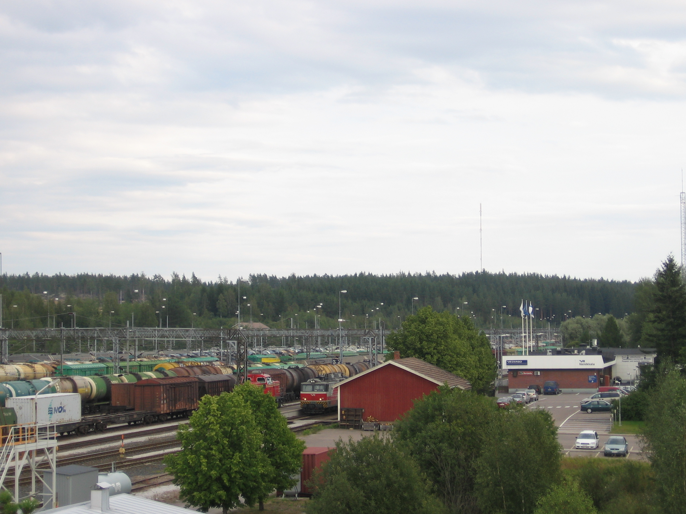 Вид на вокзал